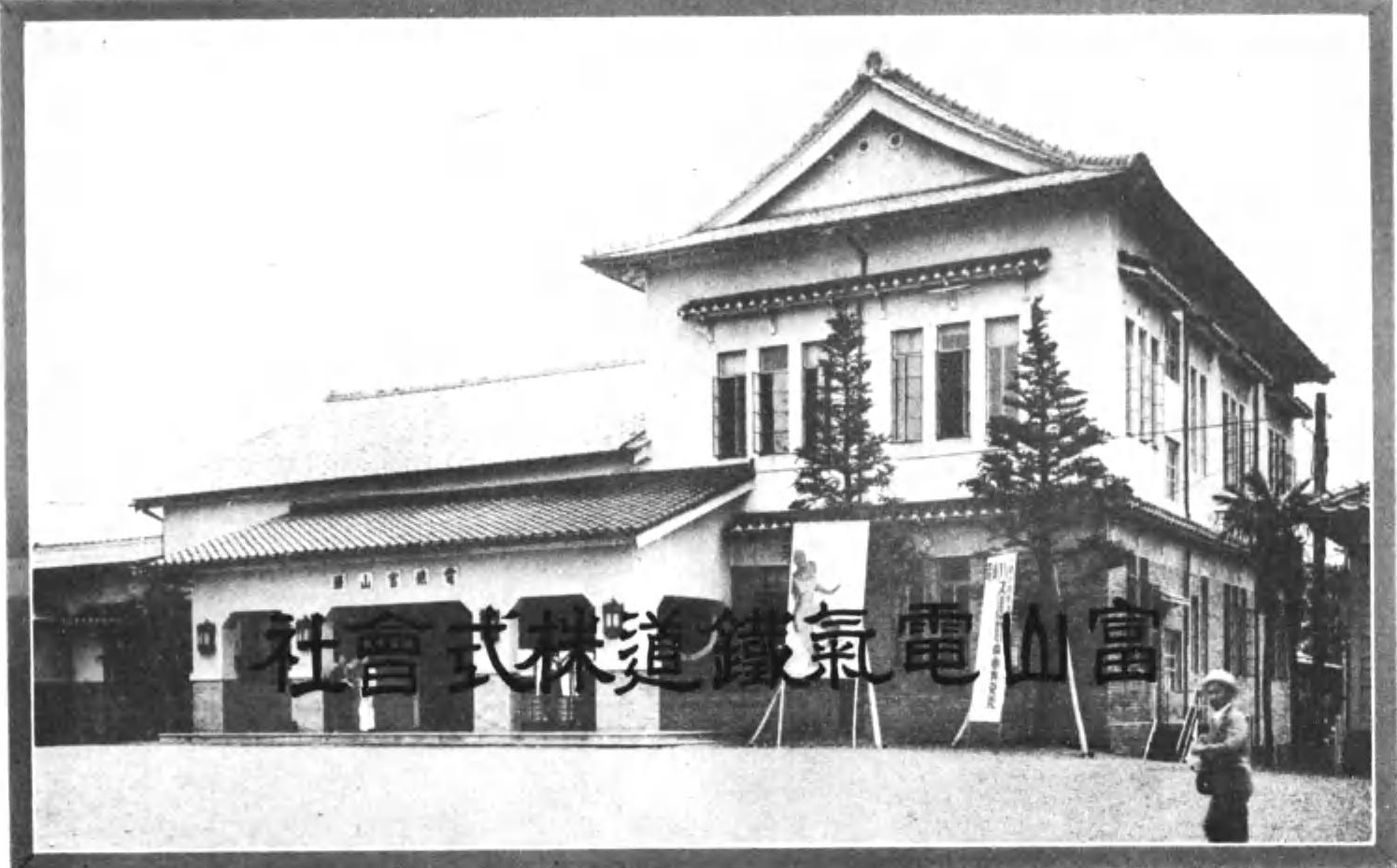 戦前の電鉄富山駅。富山電気鉄道株式会社の本社でもあった。（高岡新聞社編、『躍進富山県』、1938年（昭和13年）、高岡新聞社）